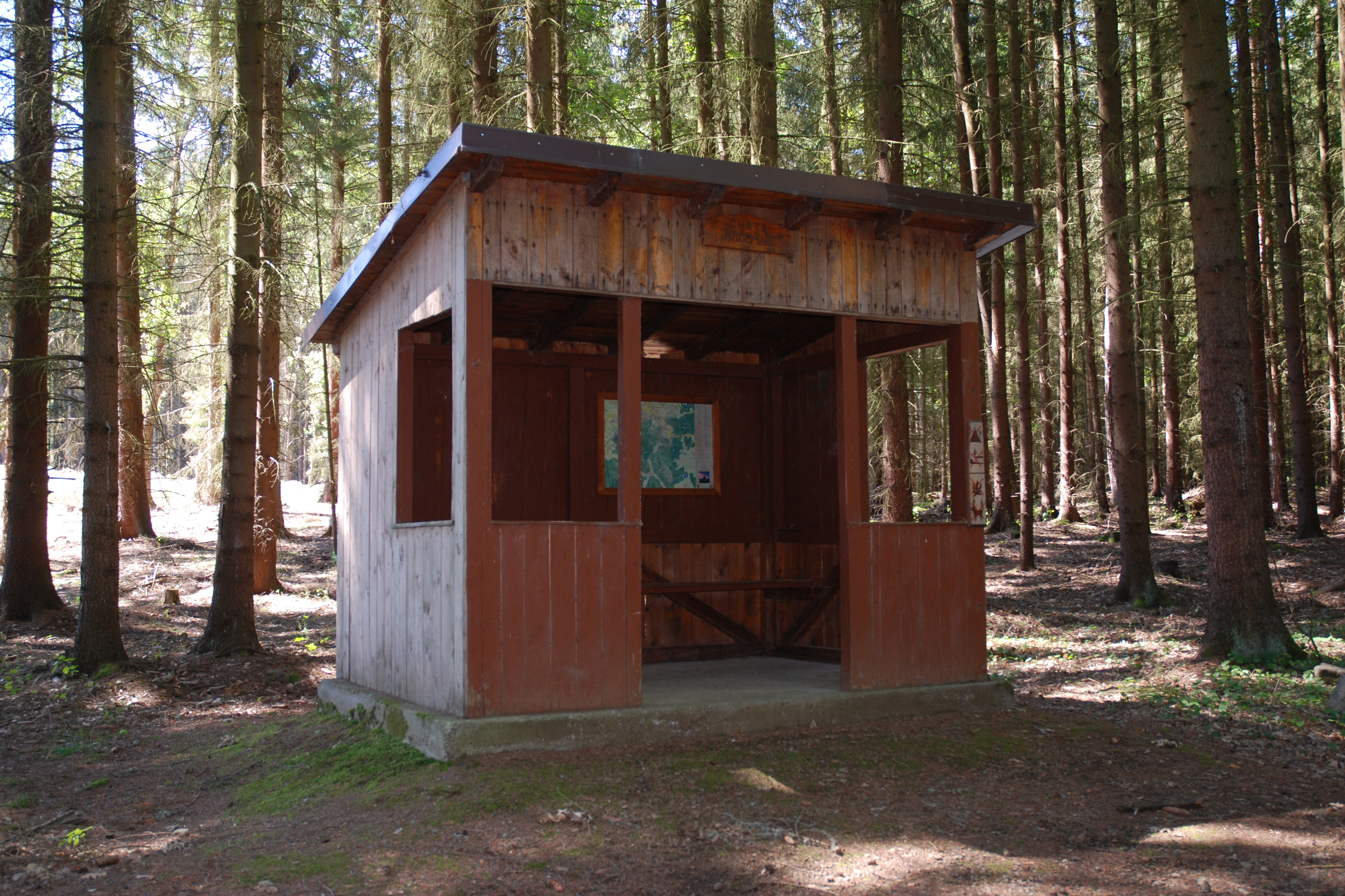 Chata Hubertus v karlovarských lázeňských lesích